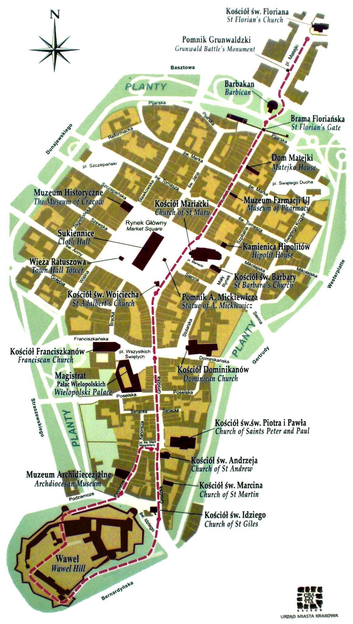 "Royal Road" in Kraków, Poland